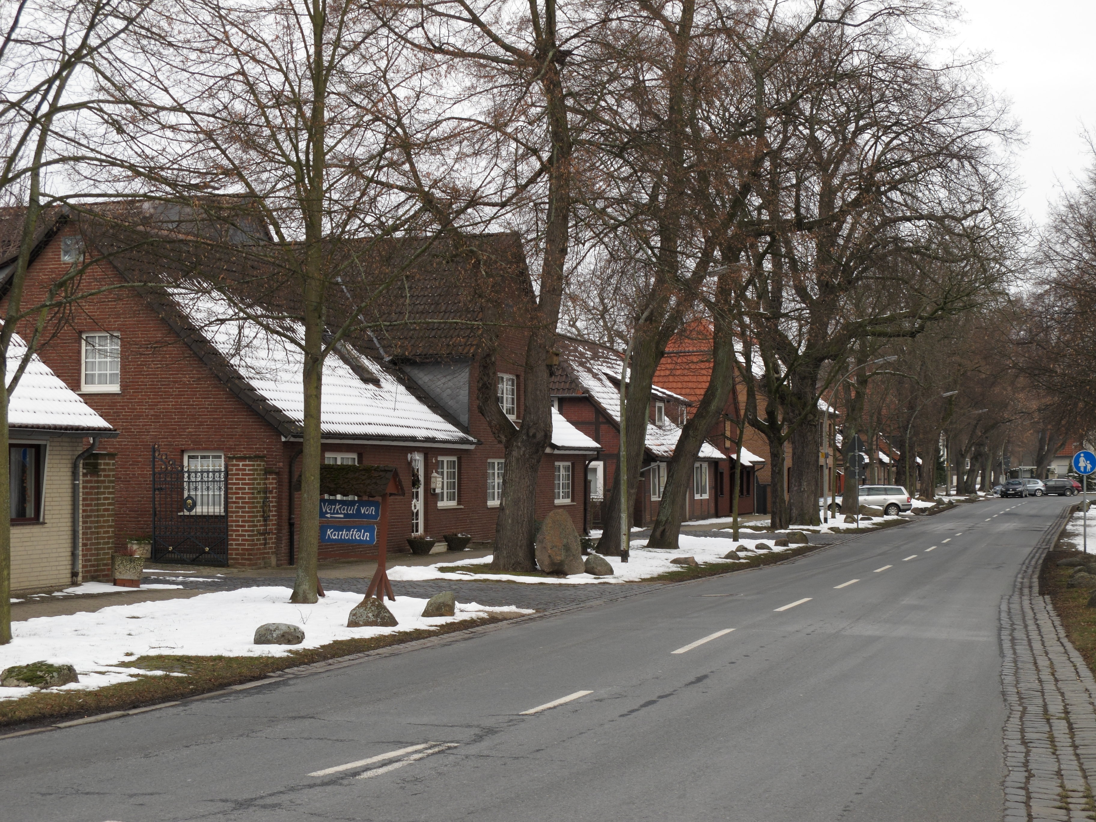 Braunschweig-Veltenhof: Unter den Linden, hier stehen noch sieben Siedlerhäuser der Pfälzer Einwanderer (links im Bild).